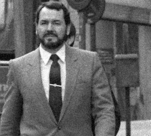 Родольфо Эдуардо Альмирон Сена